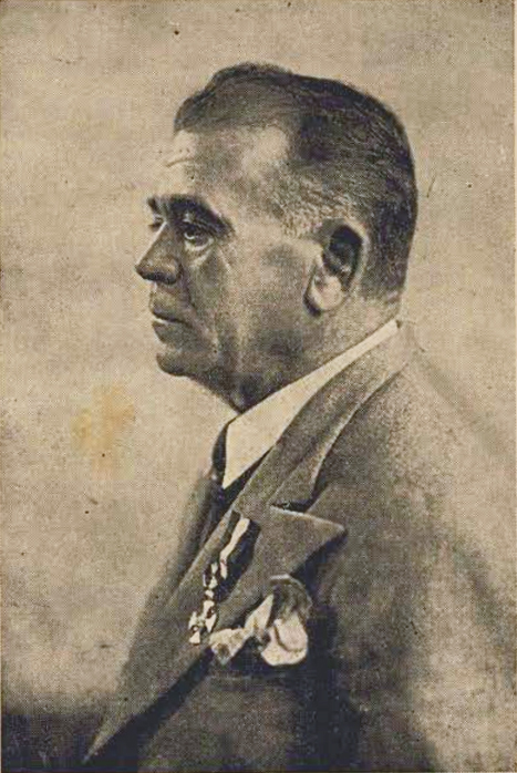 Miguel Muratore